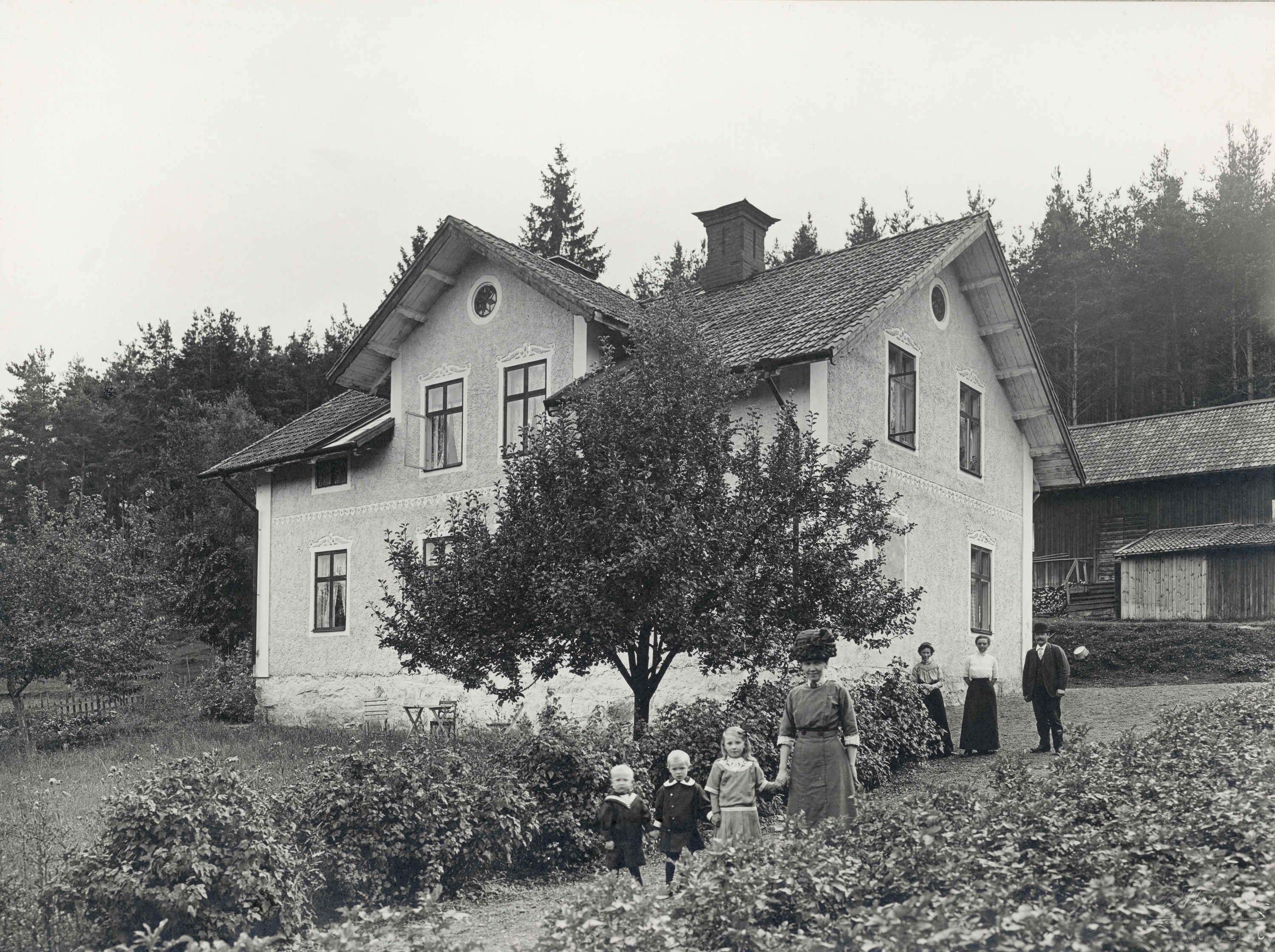 Falerum, Gärdserum sn, Småland. En kvinna med tre barn och en man bredvid två kvinnor framför en fastighet med ekonomibyggnad i bakgrunden.